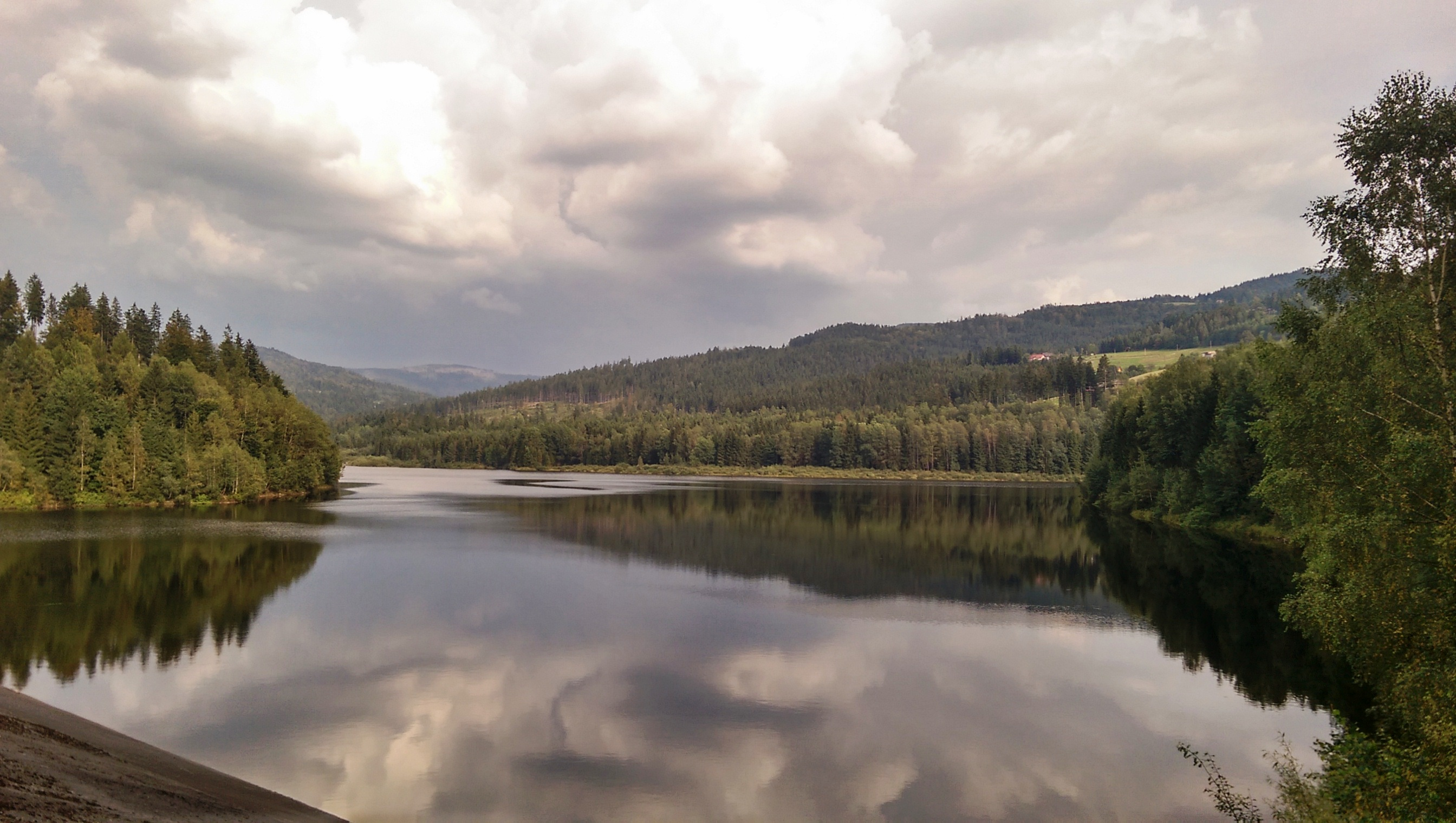 Jezioro Czerniańskie, widok z zapory